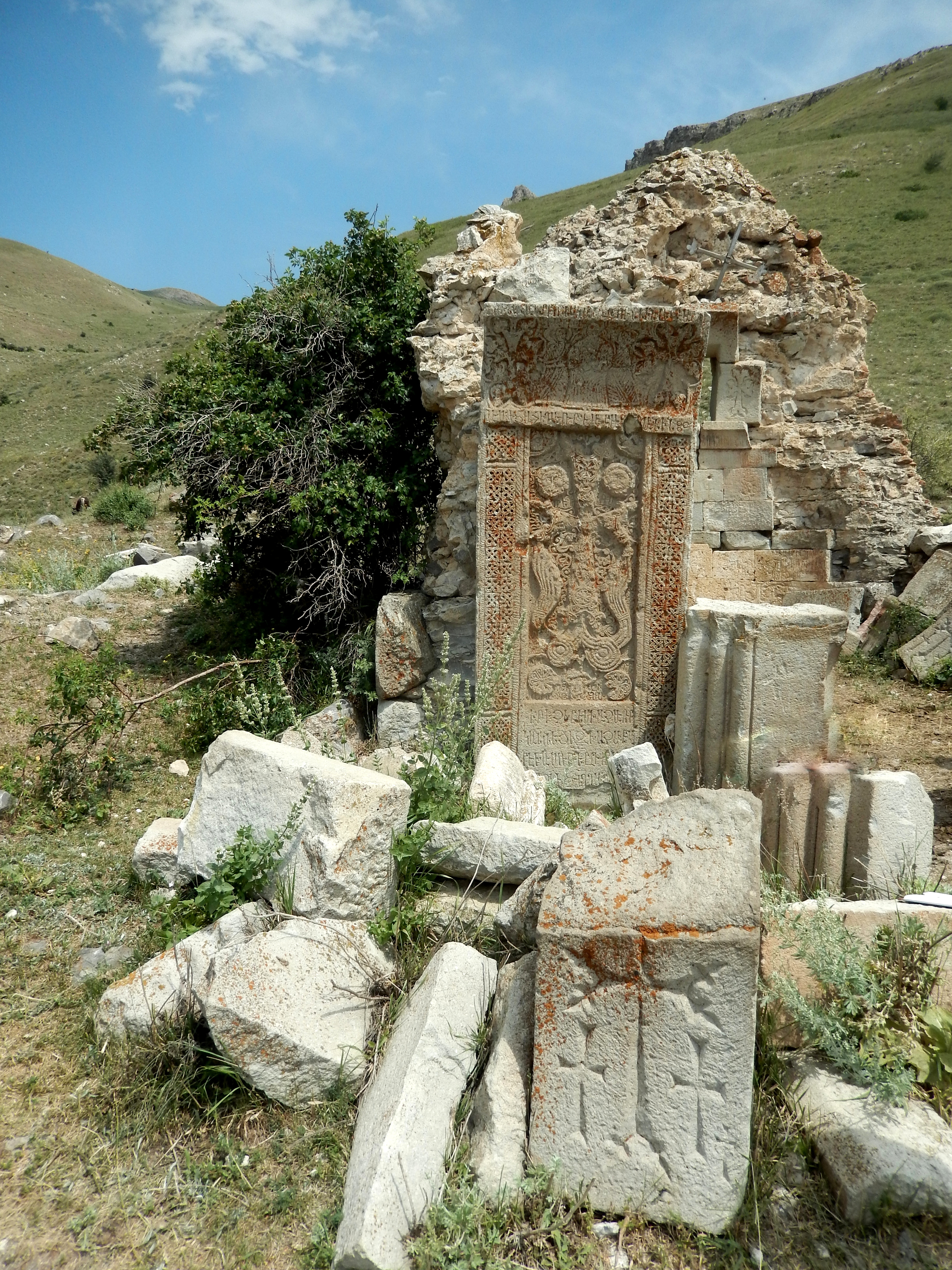 Լանջանիստի «Սպիտակ վանք» եկեղեցի 46/5.1